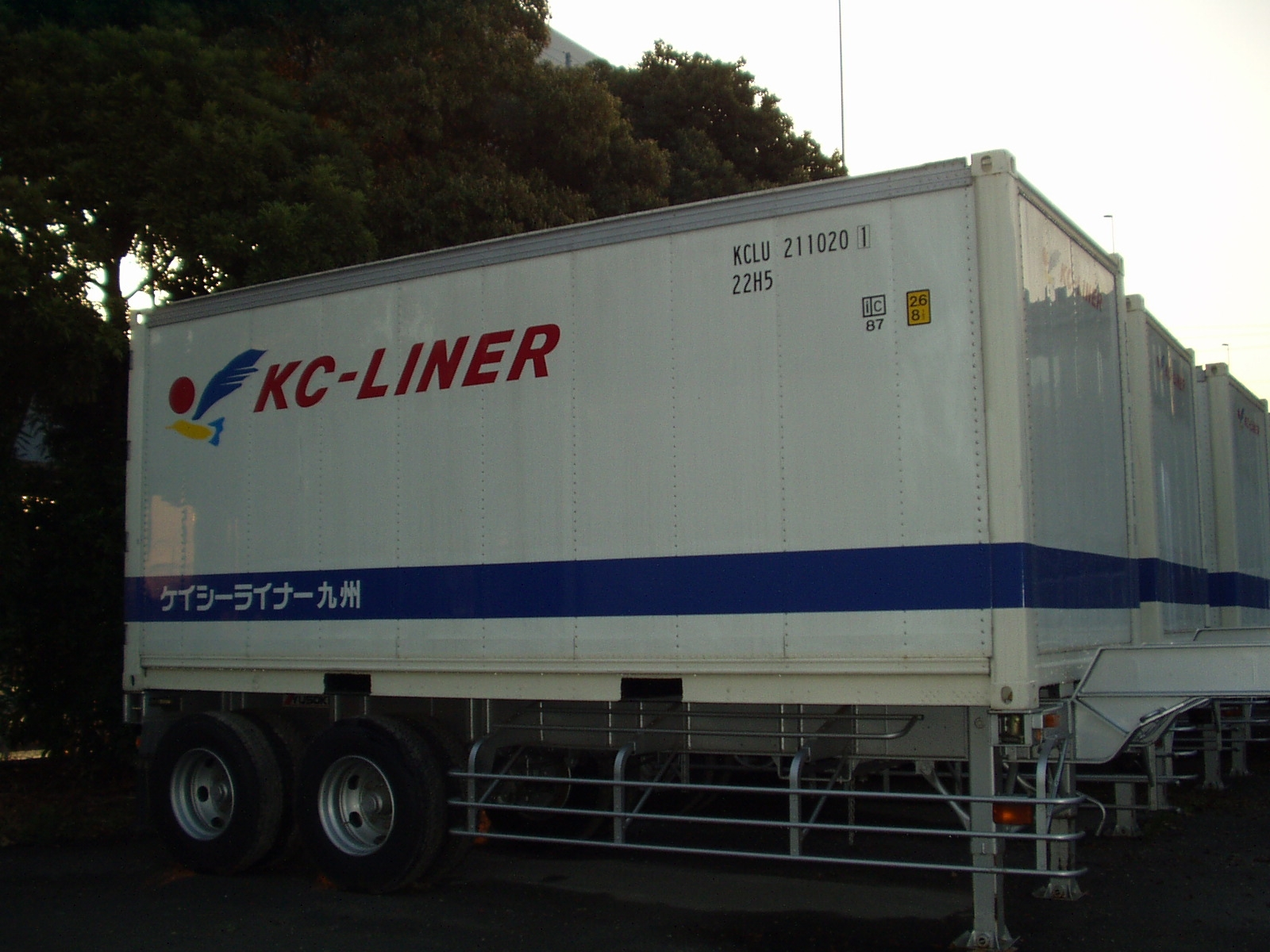 本土 ⇔ 九州地域で活躍する『 ケーシーライナー九州 』所有の20ft型、保温コンテナ。 ※新造配備直後の風景。 神奈川県／川崎市内にて